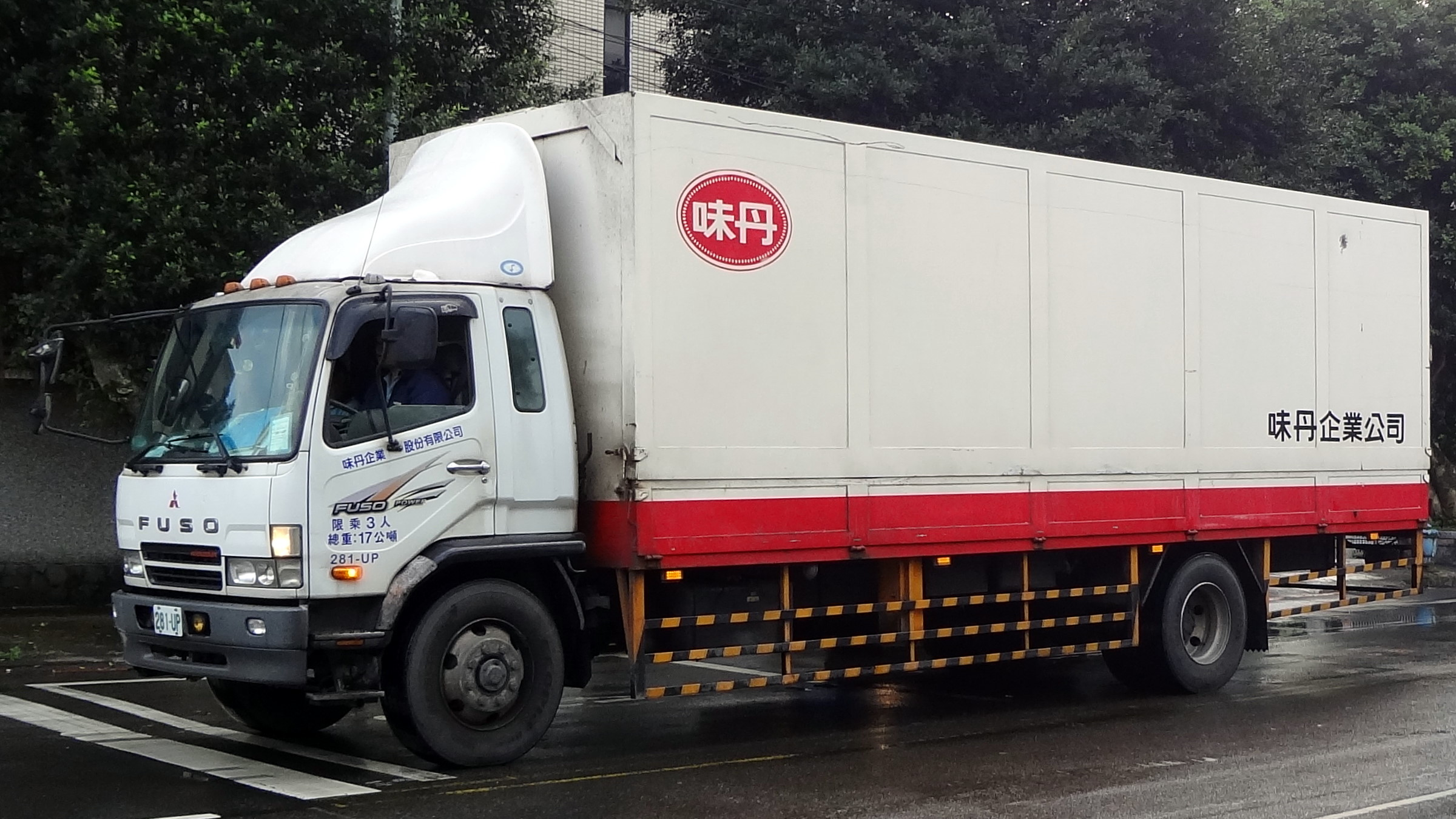 味丹企業三菱扶桑大貨車281-UP左前方外觀。